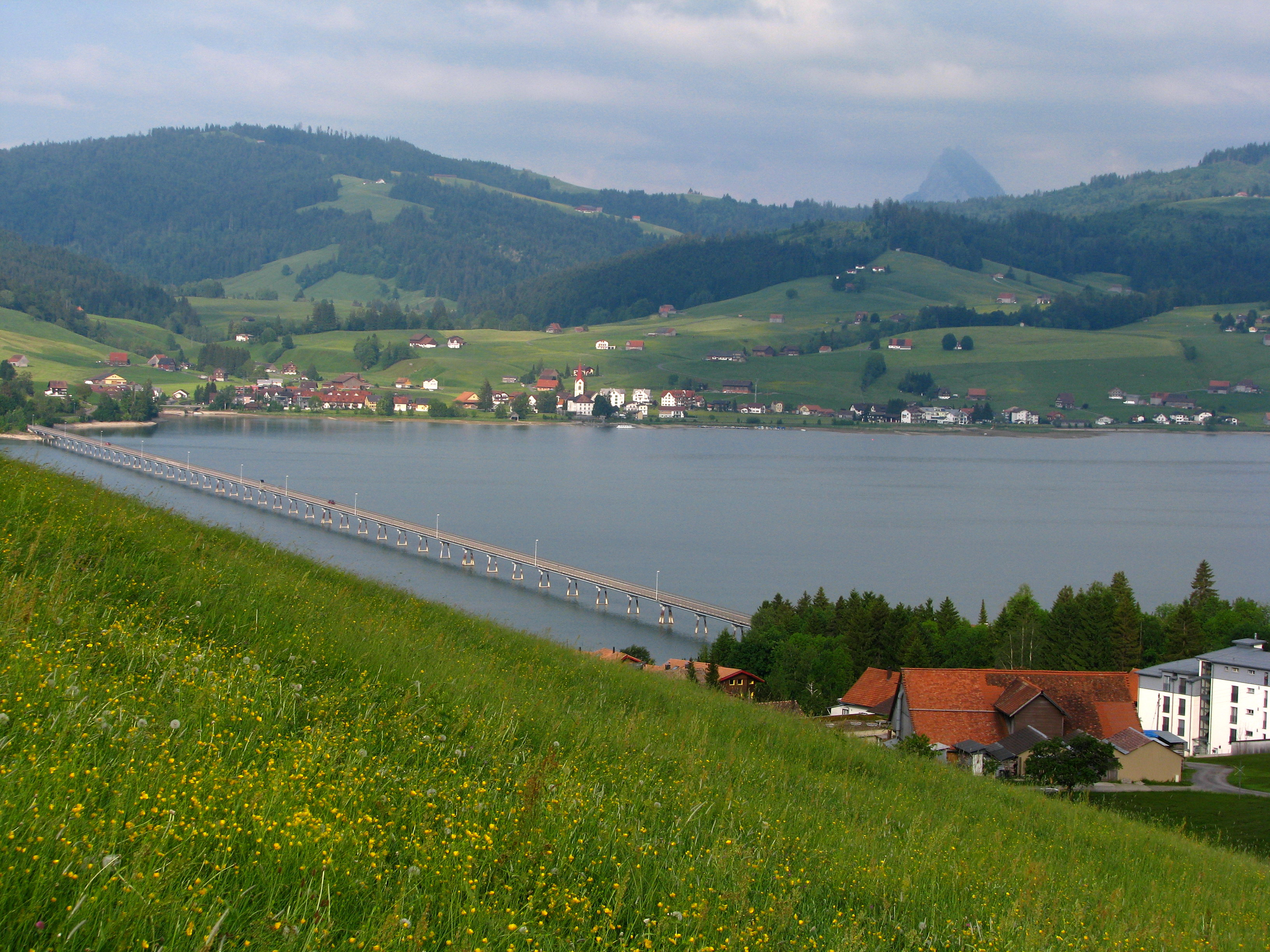 Willerzell (SZ) (Switzerland) and Sihlsee